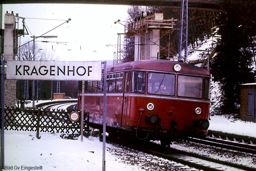 Ein Schienenbus im Haltepunkt Kragenhof der Hannoverschen Südbahn